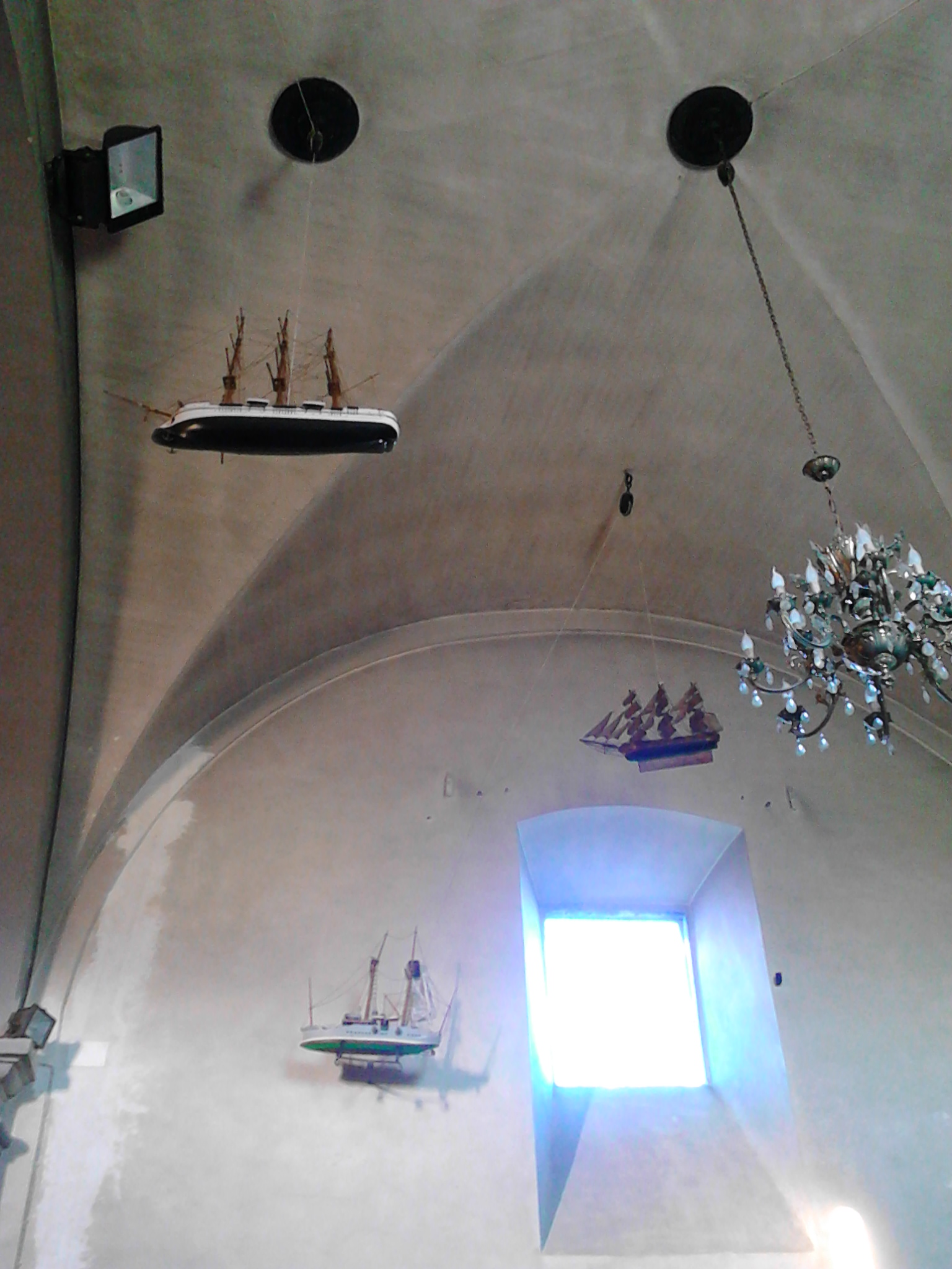 Igrexa de Vilaselán, Ribadeo. Ofrendas de maquetas de barcos 20170124